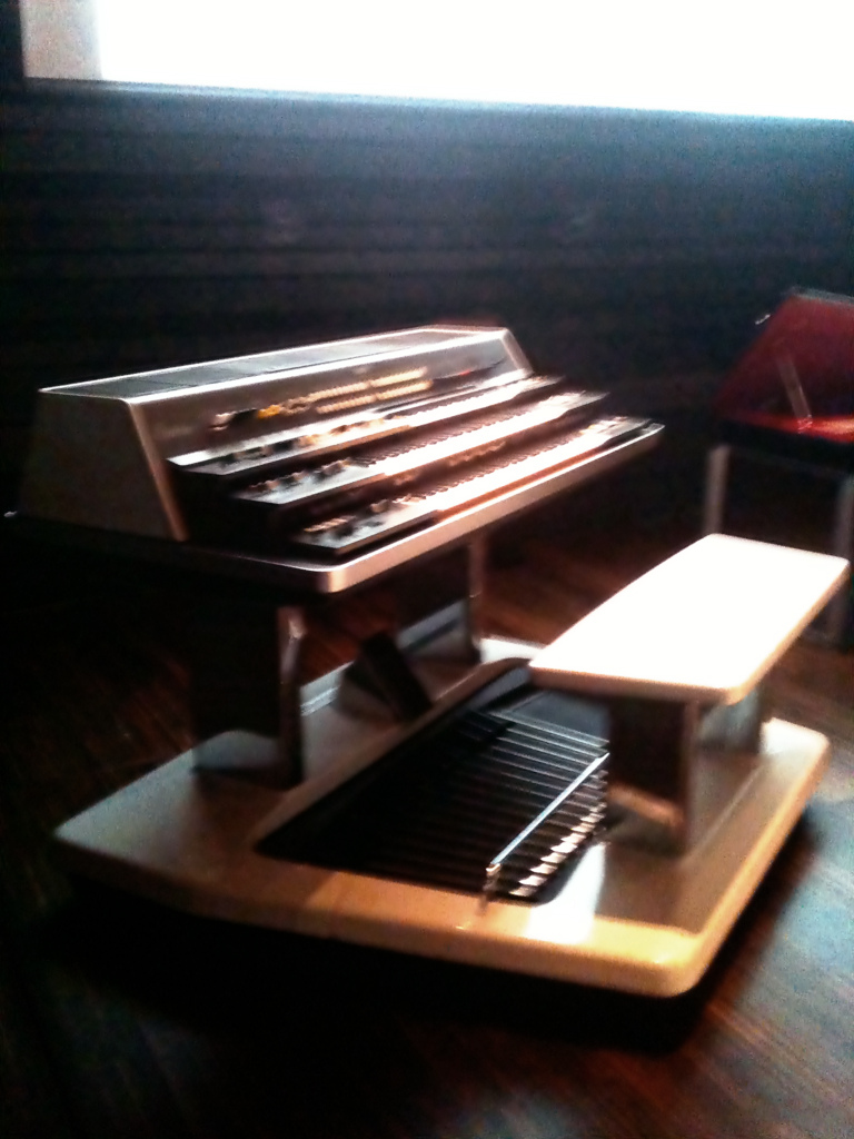 14 Yamaha GX-1, Yamaha Design Masterworks